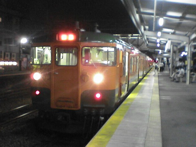 広島地区唯一の湘南色。投稿者自身による撮影。